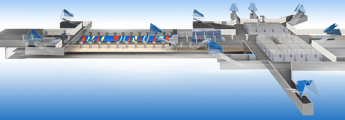 Wielobranżowy Projekt Koncepcyjny centralnego odcinka II lini metra w Warszawie